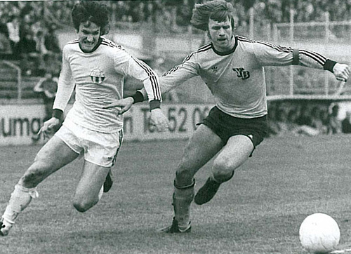 Martin Trümpler (rechts) und Daniel Jeandupeux (links)